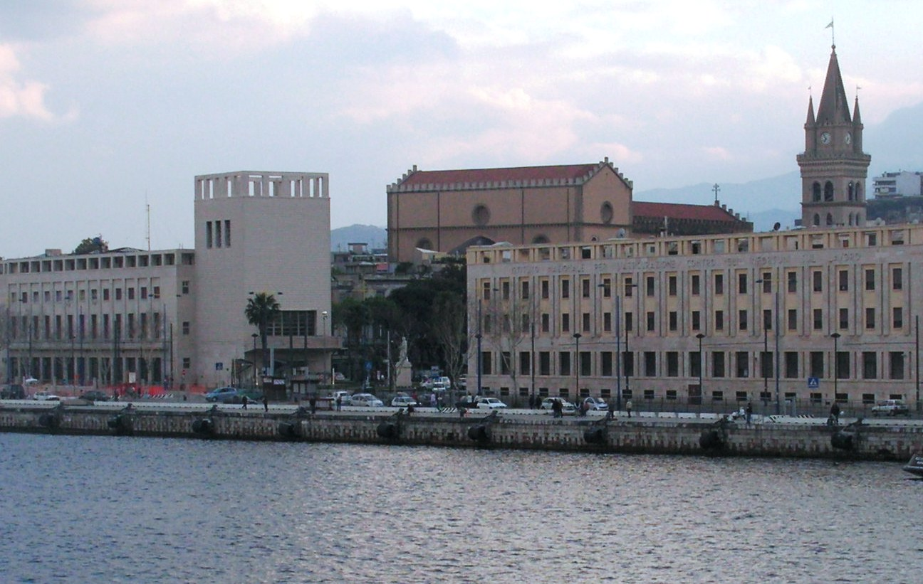 Palazzo del Catasto, ex palazzo Littorio(Giuseppe Samonà)